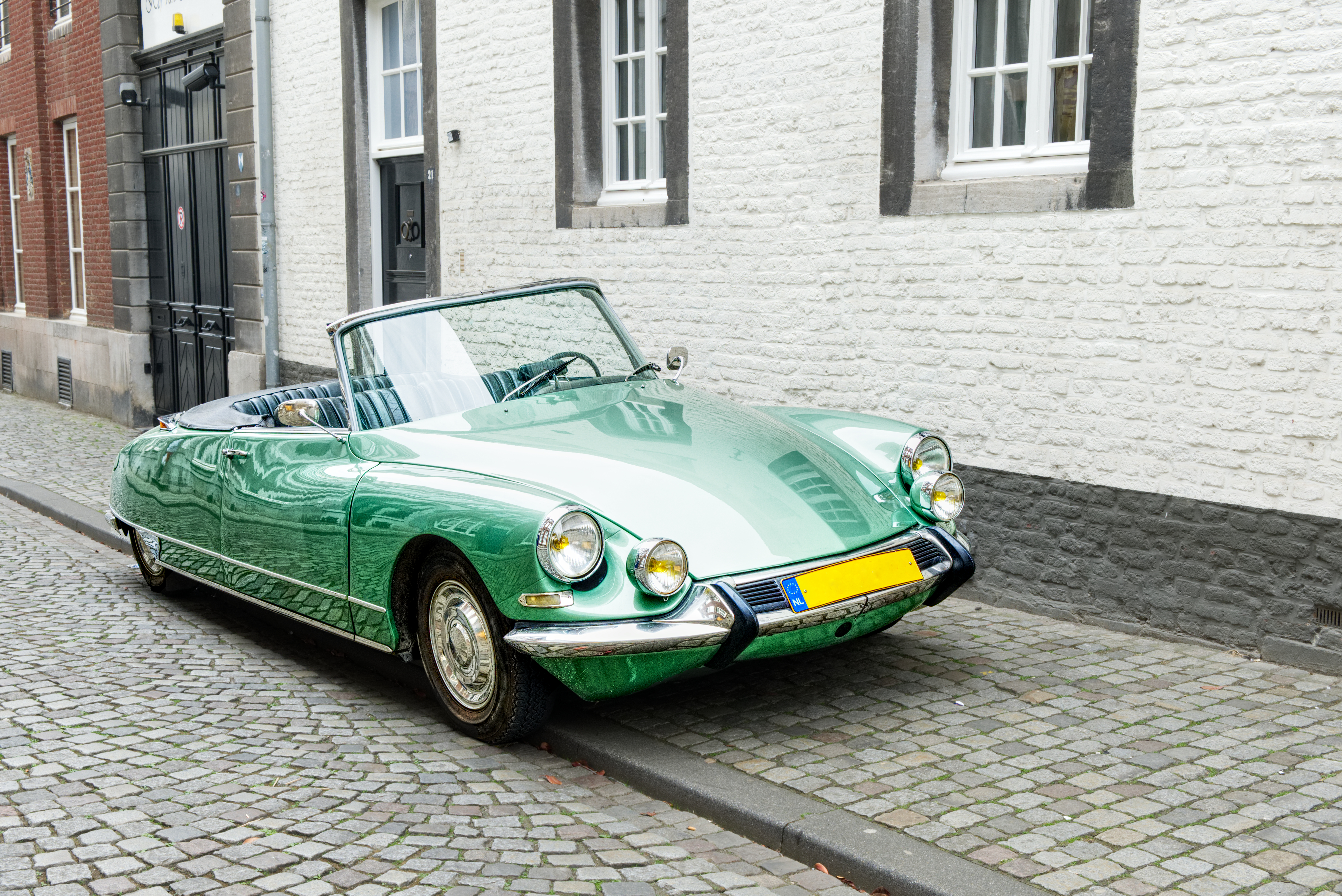 shiny green Citroën DS in Lenculenstraat in Maastricht.